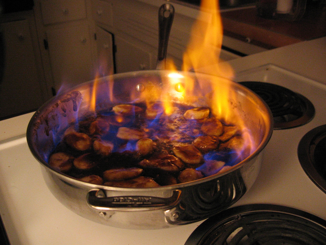 Banana flambébanana flambè